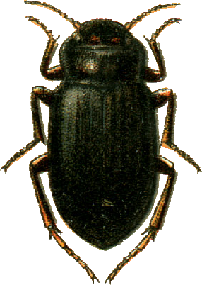 This file has been extracted from another file: Jacobs12.jpg